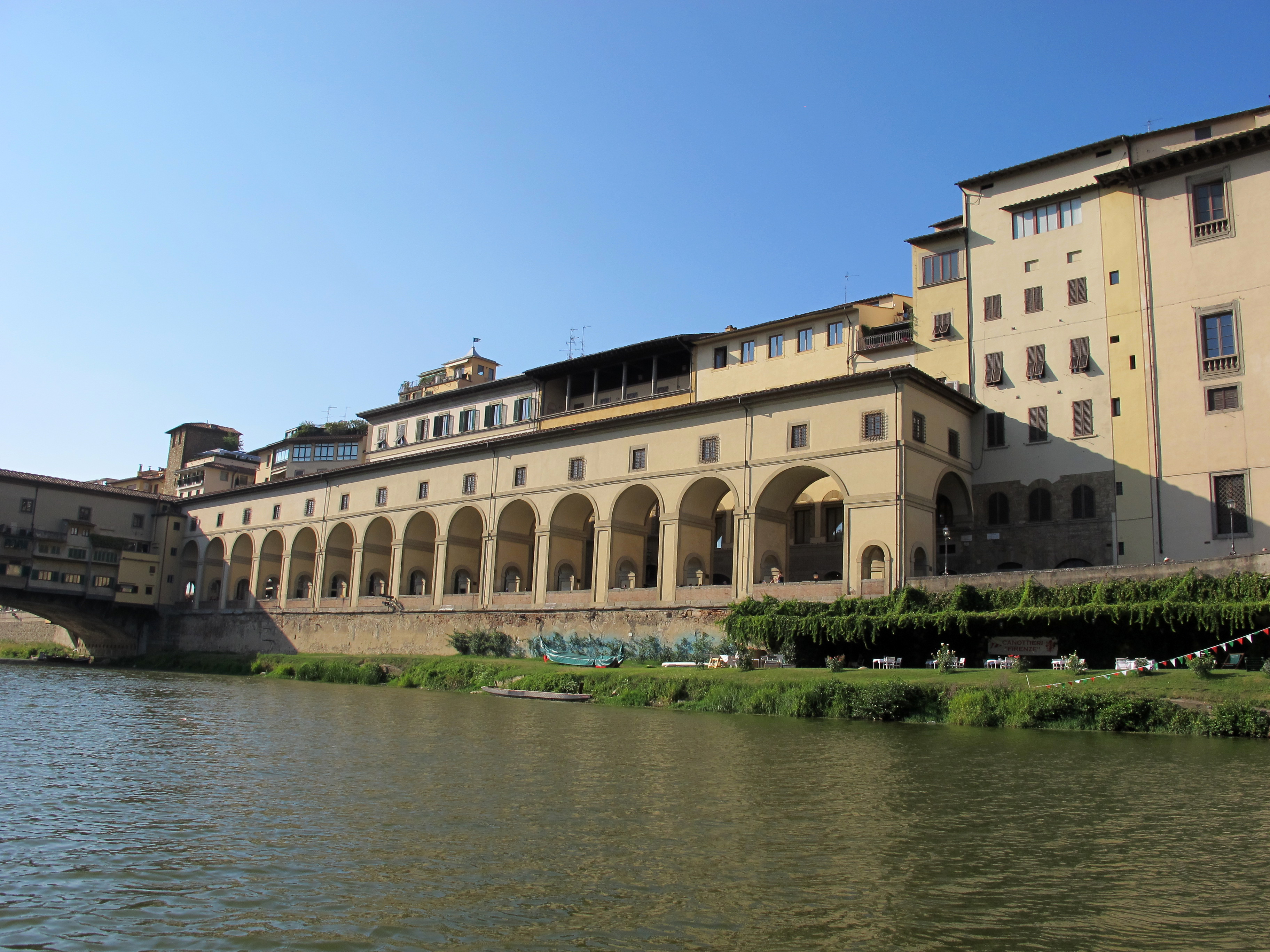 Lungarno degli archibugieri (corridoio vasariano) visto dal fiume